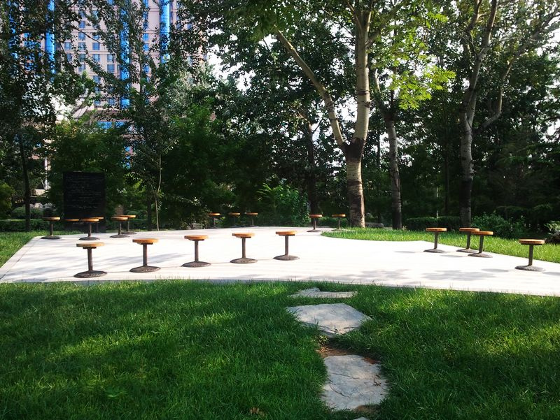 南开大学省身楼前